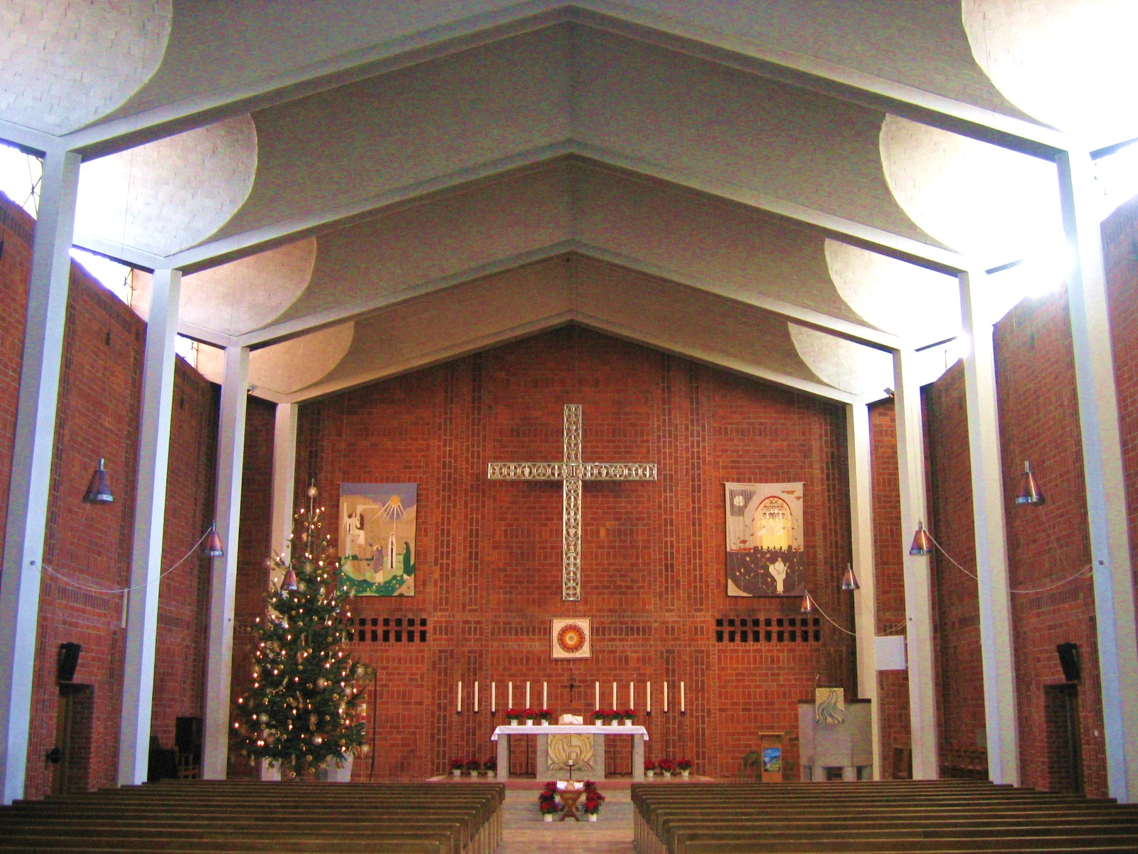 Innenraum der Paul-Gerhardt-Kirche in München.